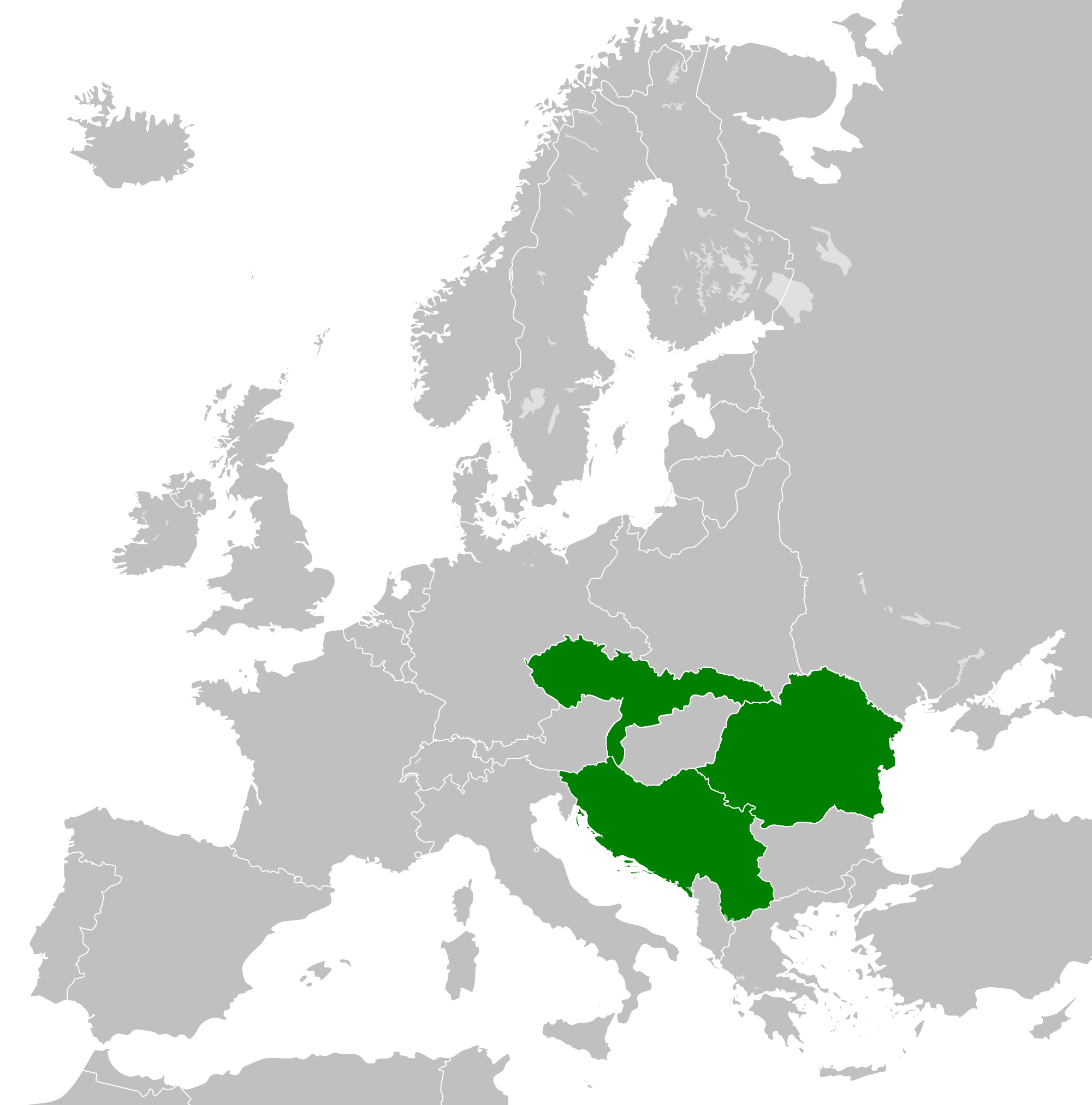 Vizualizácia krajín Malej dohody s Českým koridorom